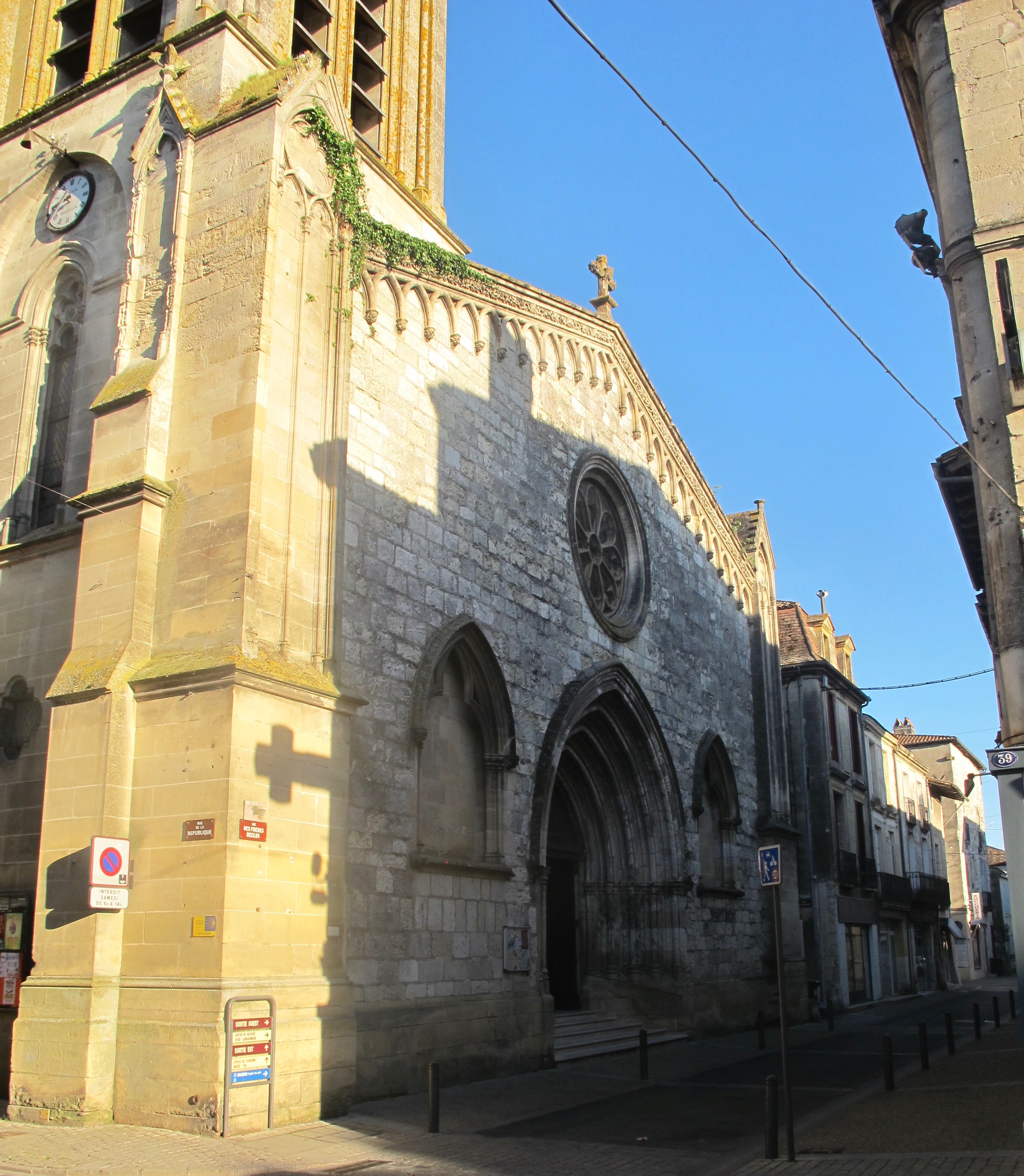 Église Notre-Dame de Sainte-Foy-la-Grande (Gironde).